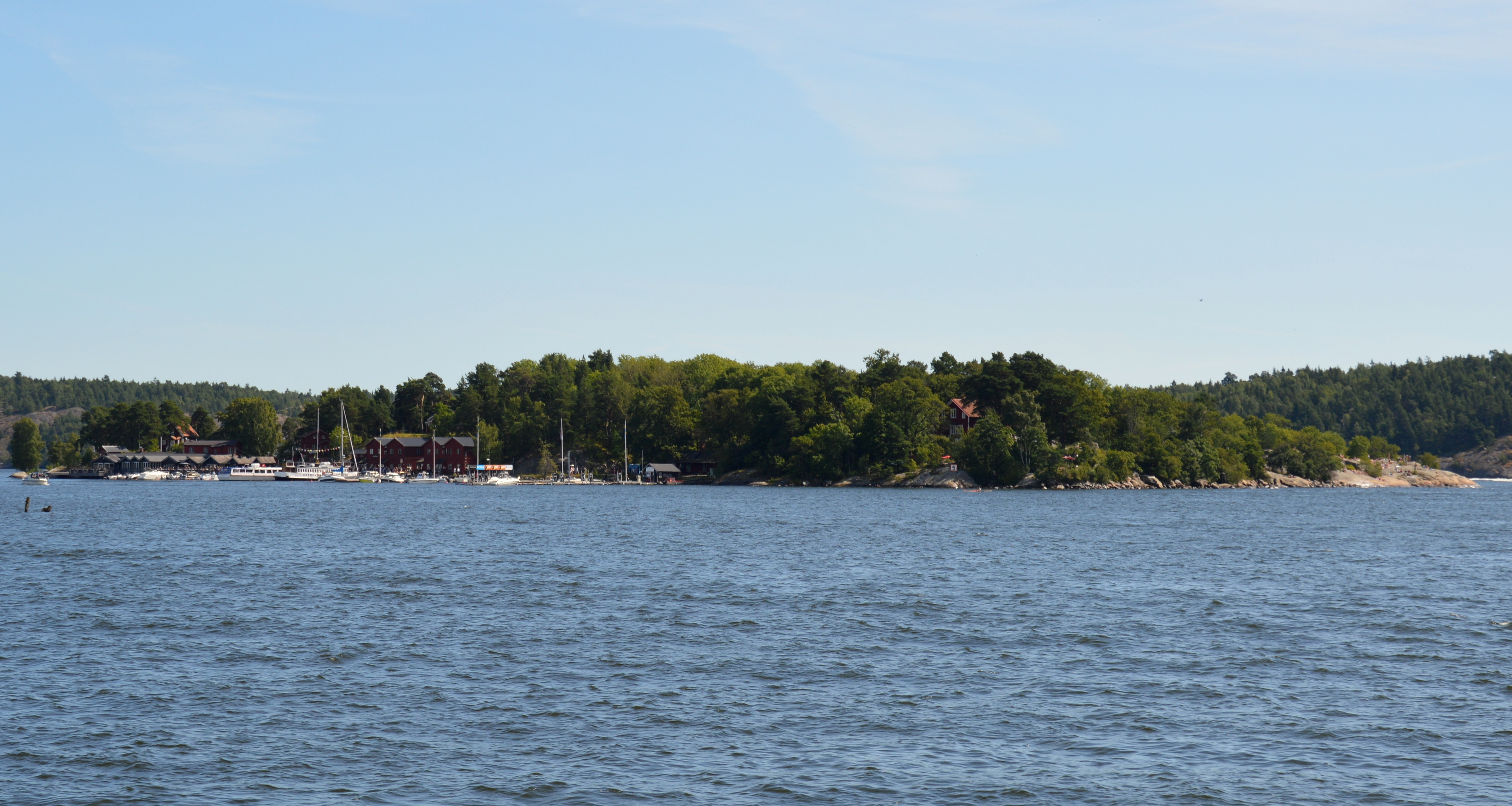 Stora Fäderholmarna Blick von Nordwesten